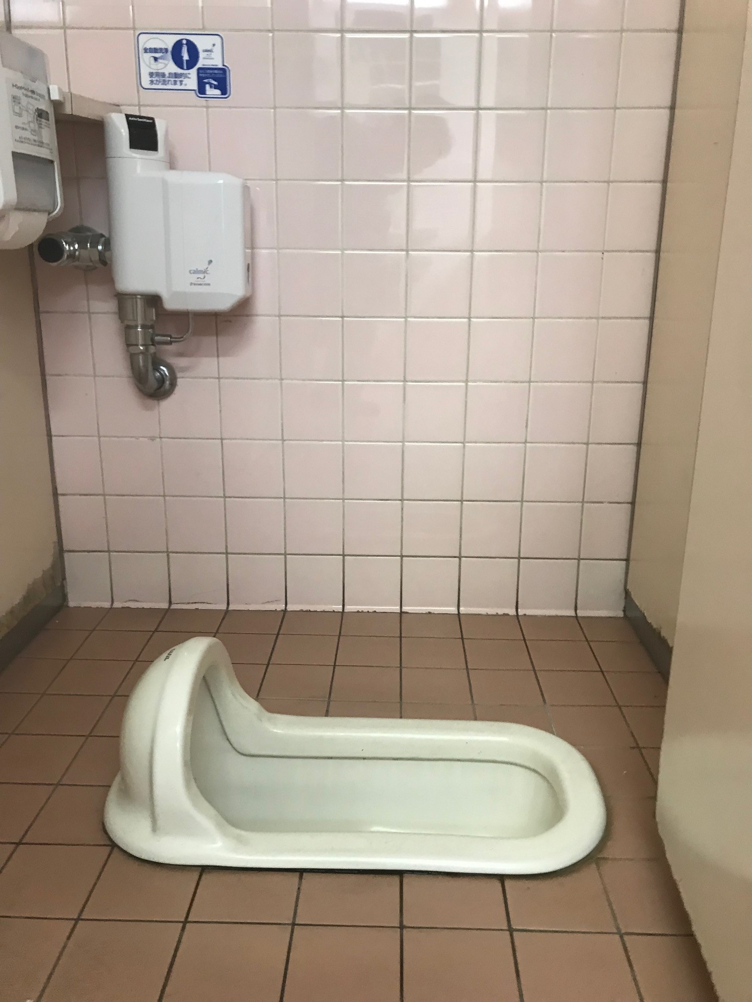 オートサニタイザーMK55